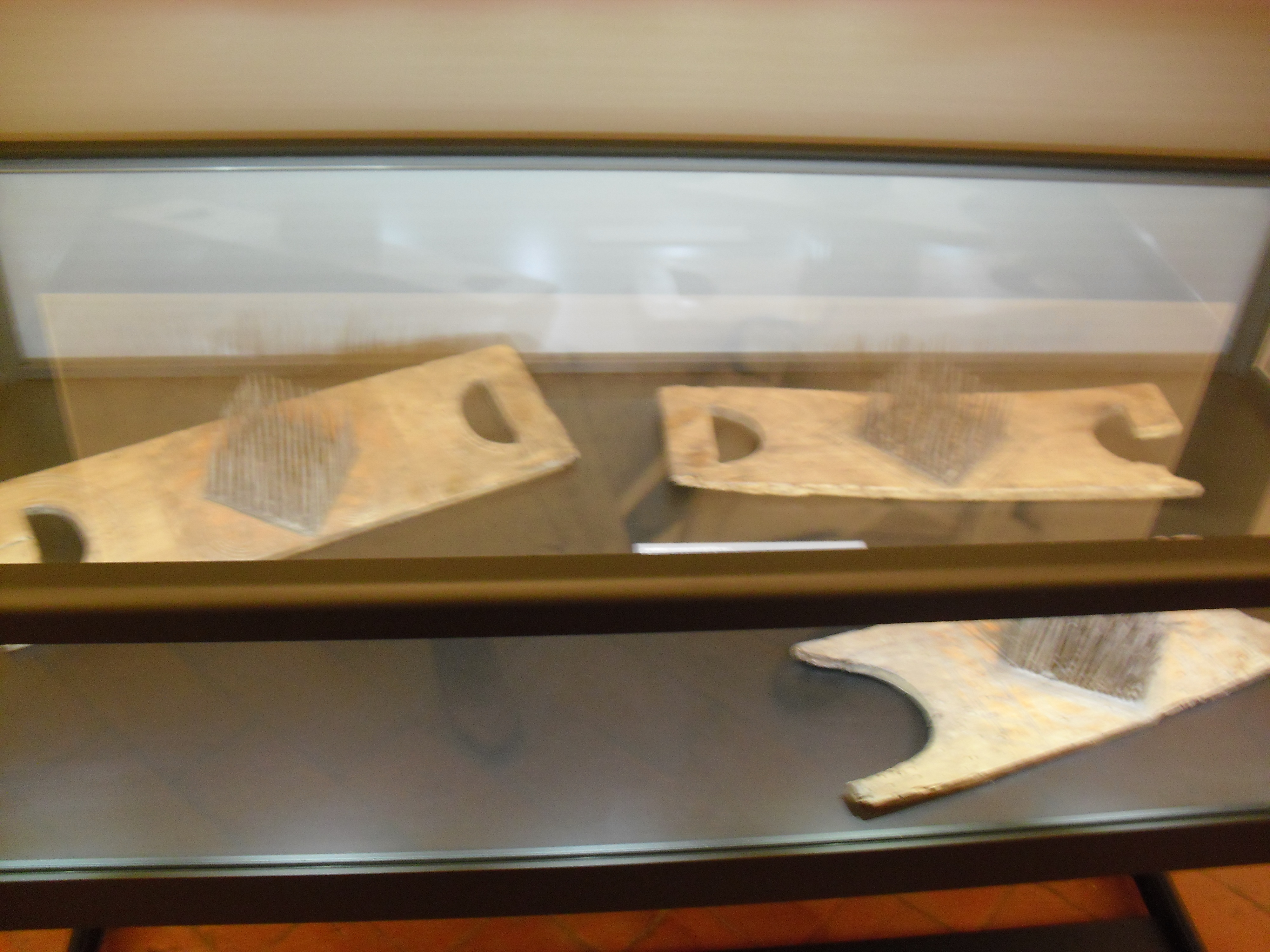 Spazzole per cardatura conservate nel Museo Goffredo Bellini di Asola